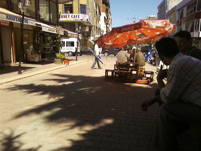 Karasu (Merkez)